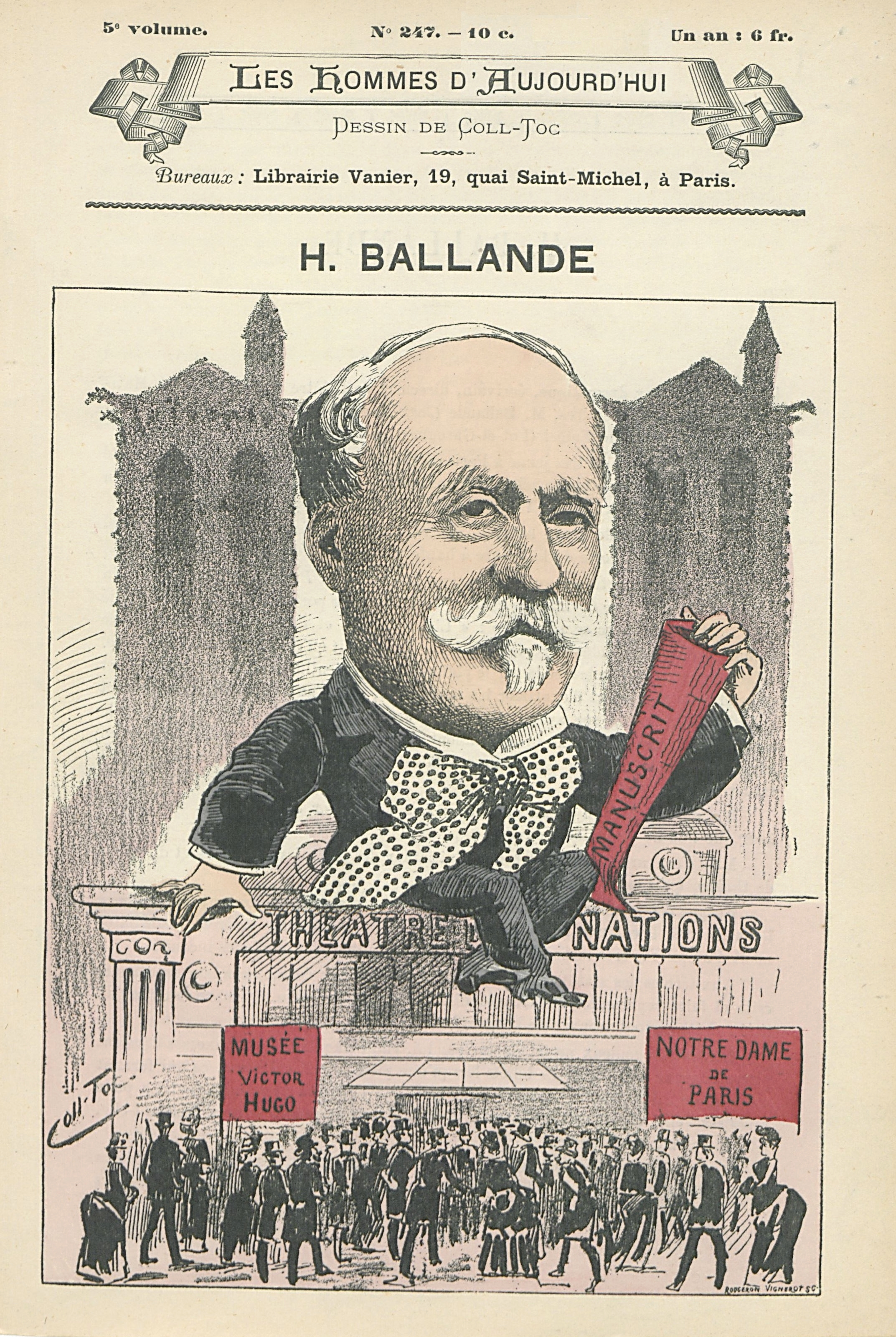 (1843-1913) Dessin de Coll-Toc. les Hommes d'aujourd'hui n°247, vers 1884